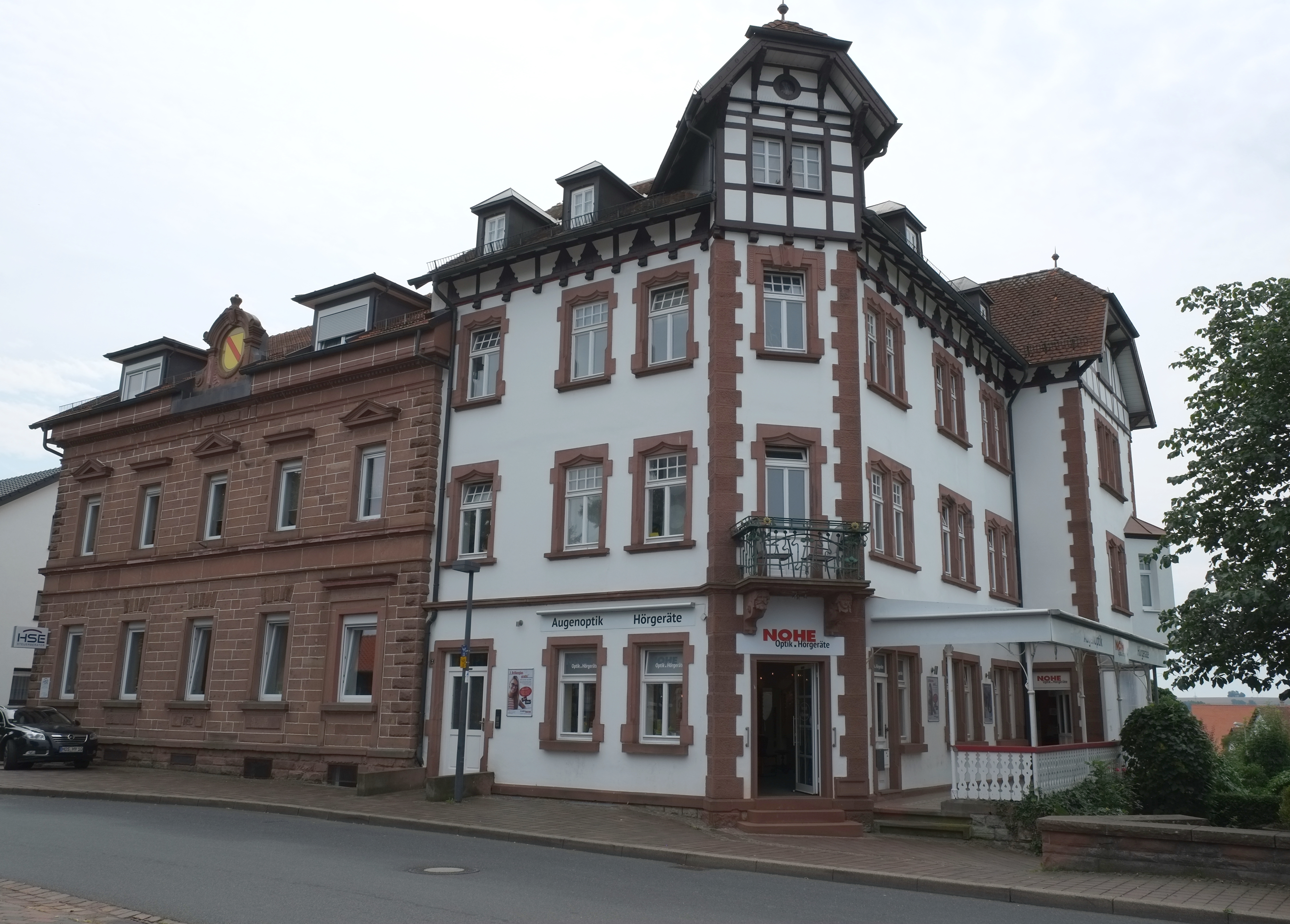 Bahnhof-Hotel (Eisenbahnstraße 1-2) in Buchen (Odenwald) im Neckar-Odenwald-Kreis (Baden-Württemberg, Deutschland)